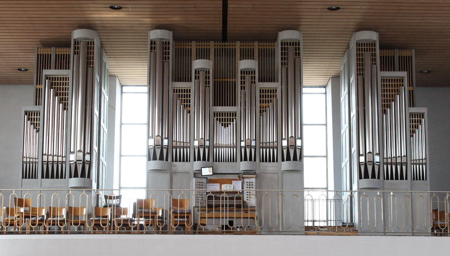 Orgel zu den Heiligen 12 Aposteln in München (1996, Karl Schuke Orgelbau op. 500, II/38)